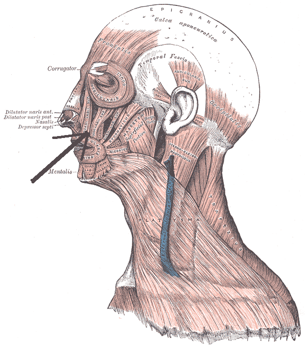 Felsőajak-emelőizom